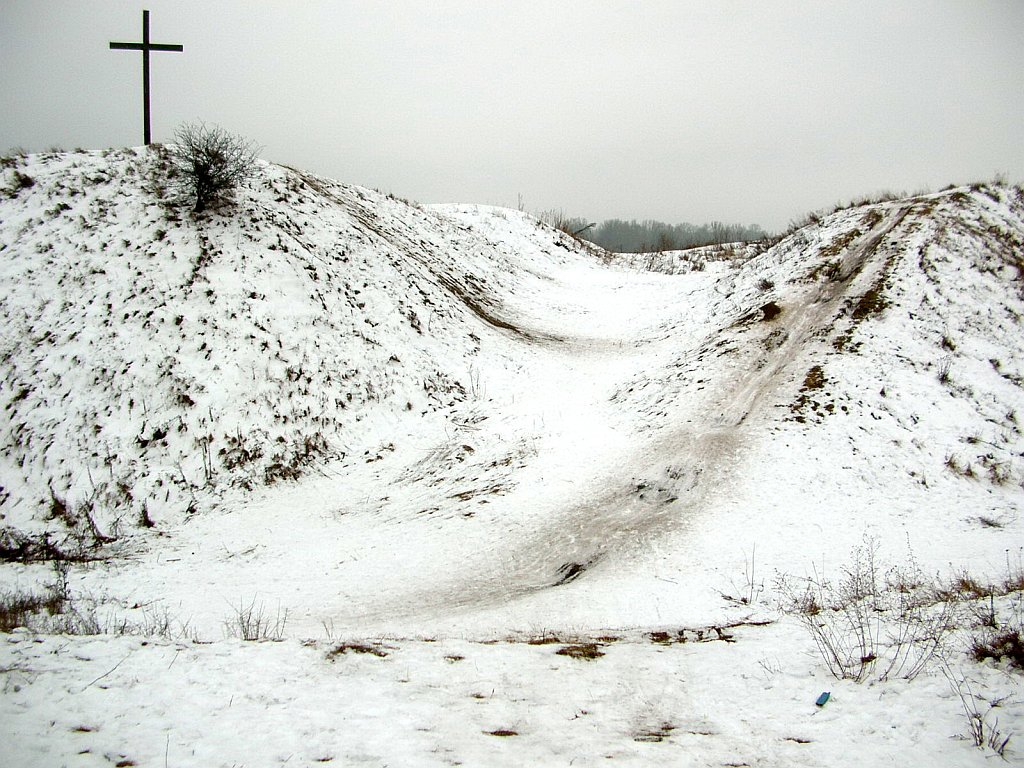 Grodzisko Wyszogród w Bydgoszczy - zima